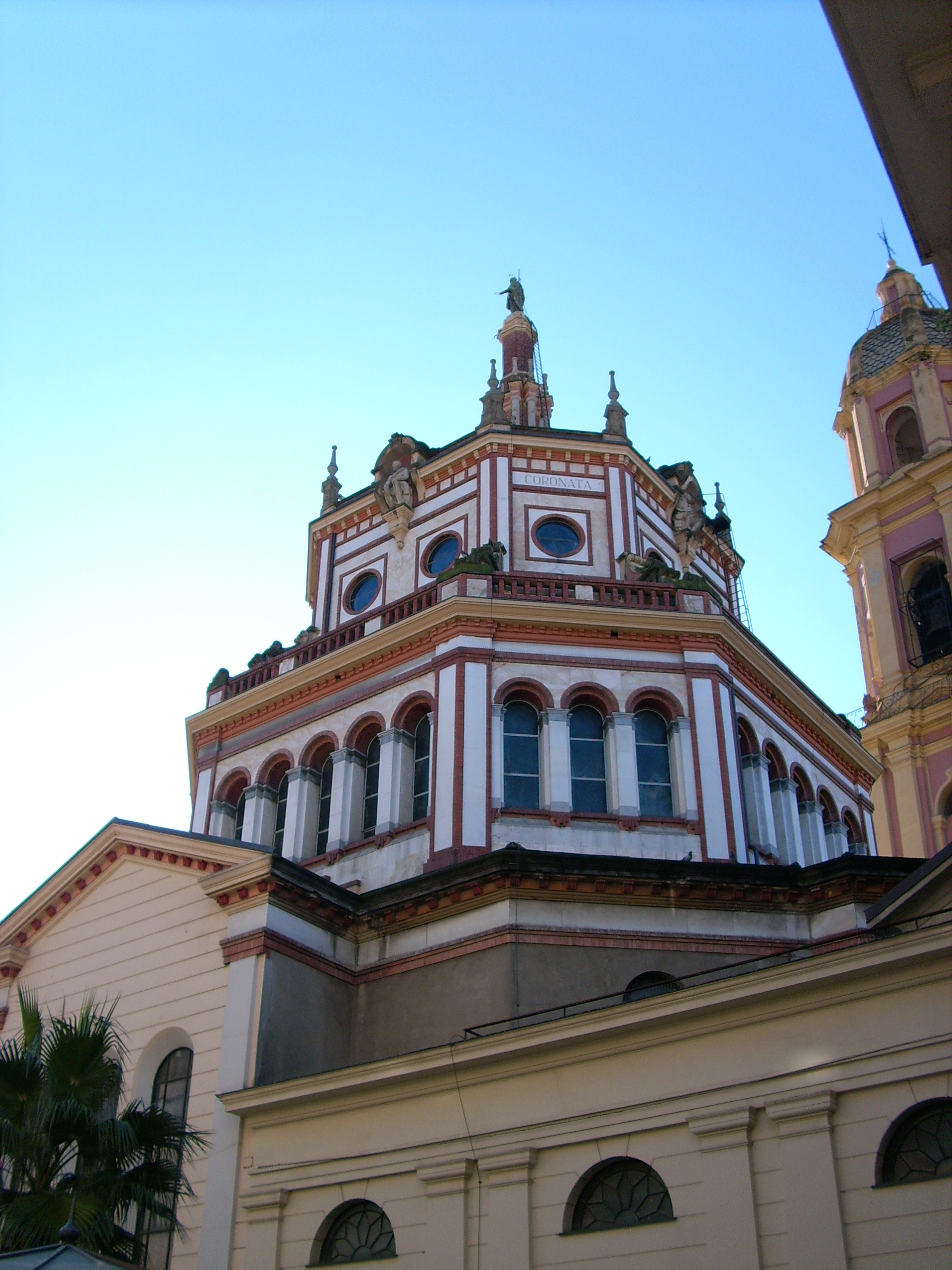 Cupola della basilica dei S.S. Gervasio e Protasio di Rapallo, Liguria, Italy